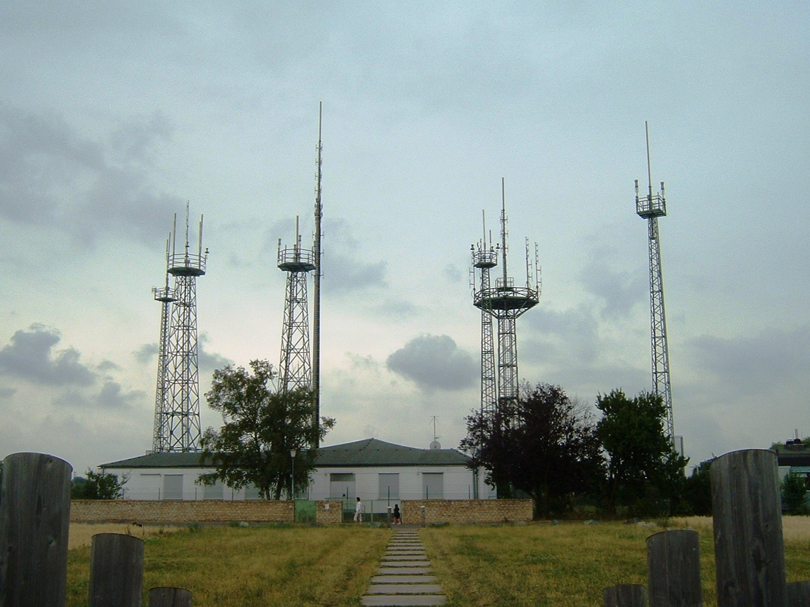 Antennenanlage der Deutschen Flugsicherung, nördlich von Dreieichenhain am Weg "Auf der Hub"